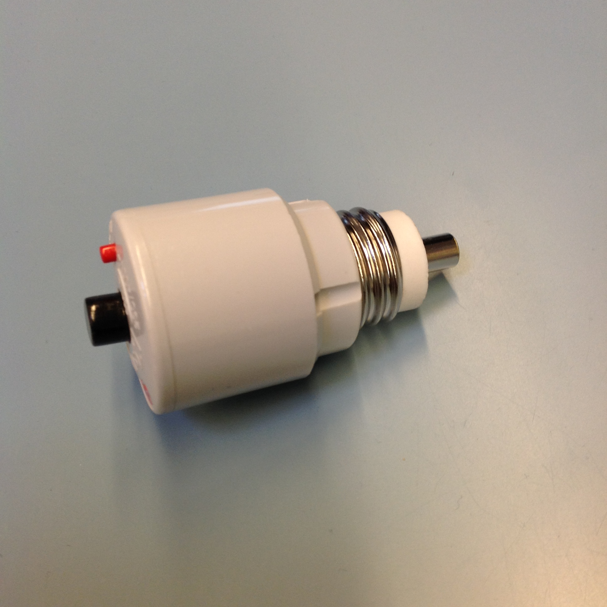 Tulppasulakeautomaatilla voidaan korvata perinteinen tulppasulake.